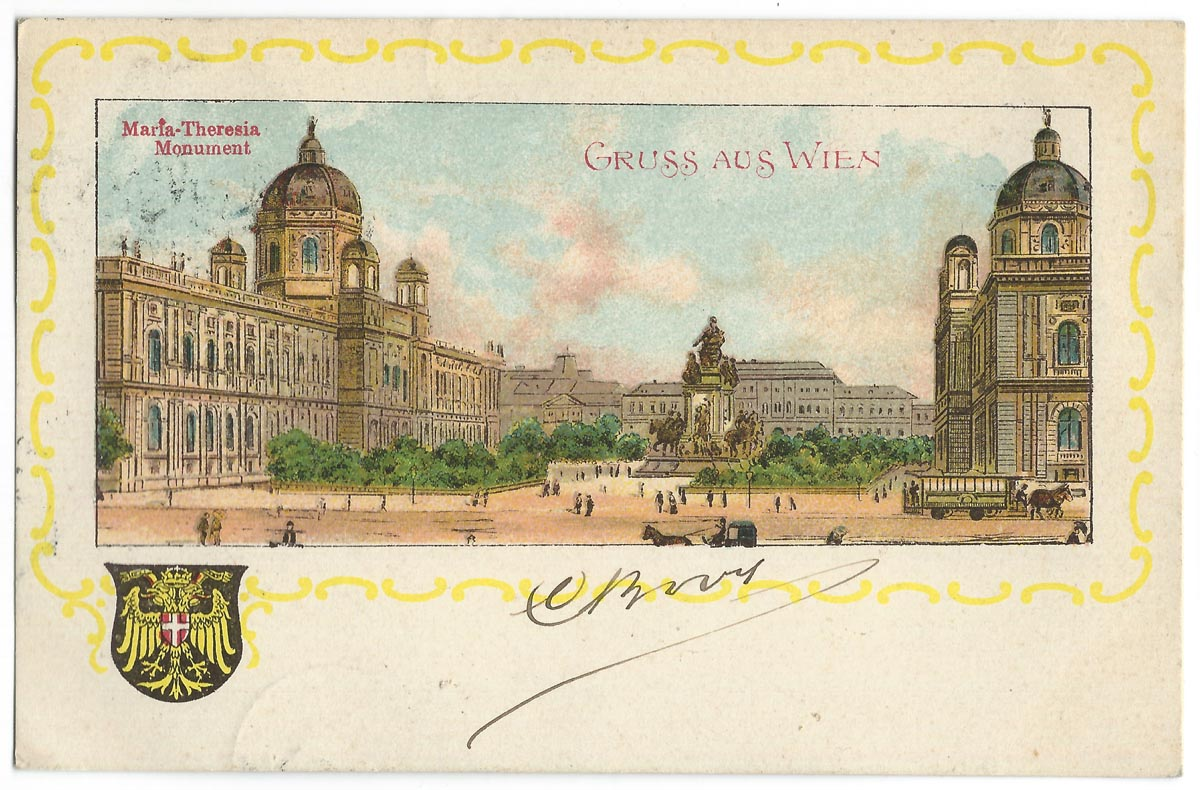 Vue de Vienne au début du XXe siècle.